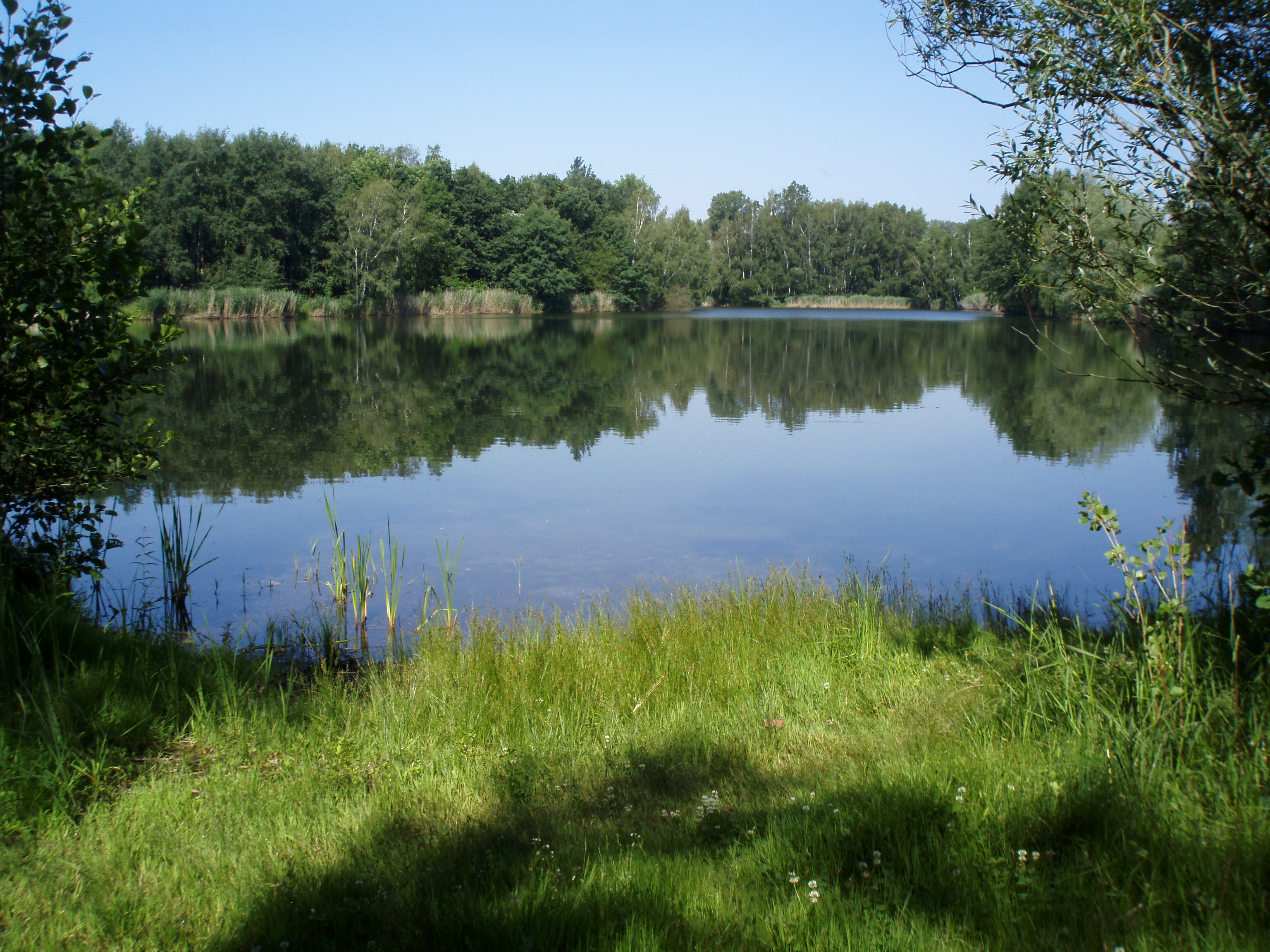 Rybník Borovinka